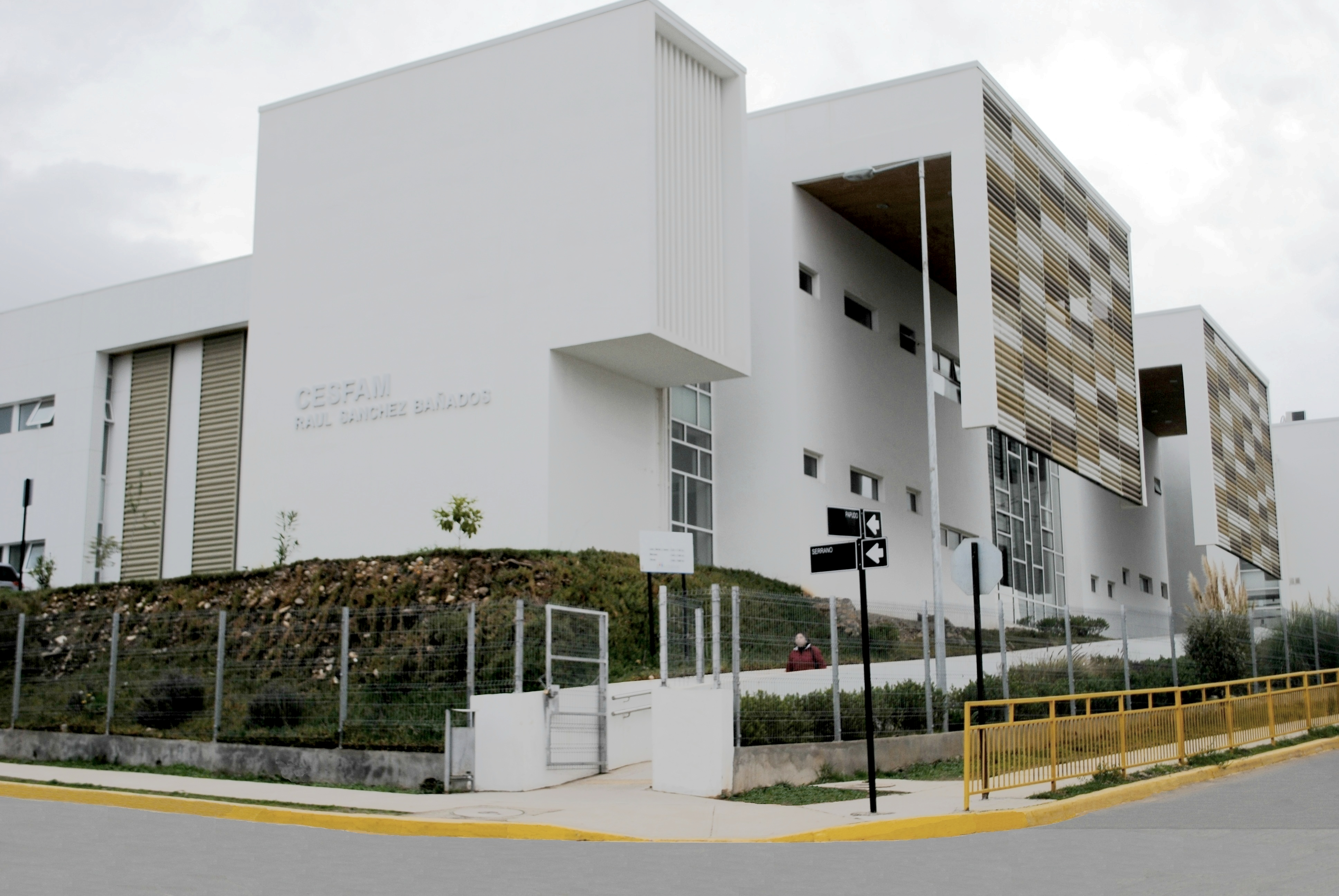 Centro de Salud Familiar de La Ligua, Región de Valparaíso, Chile.